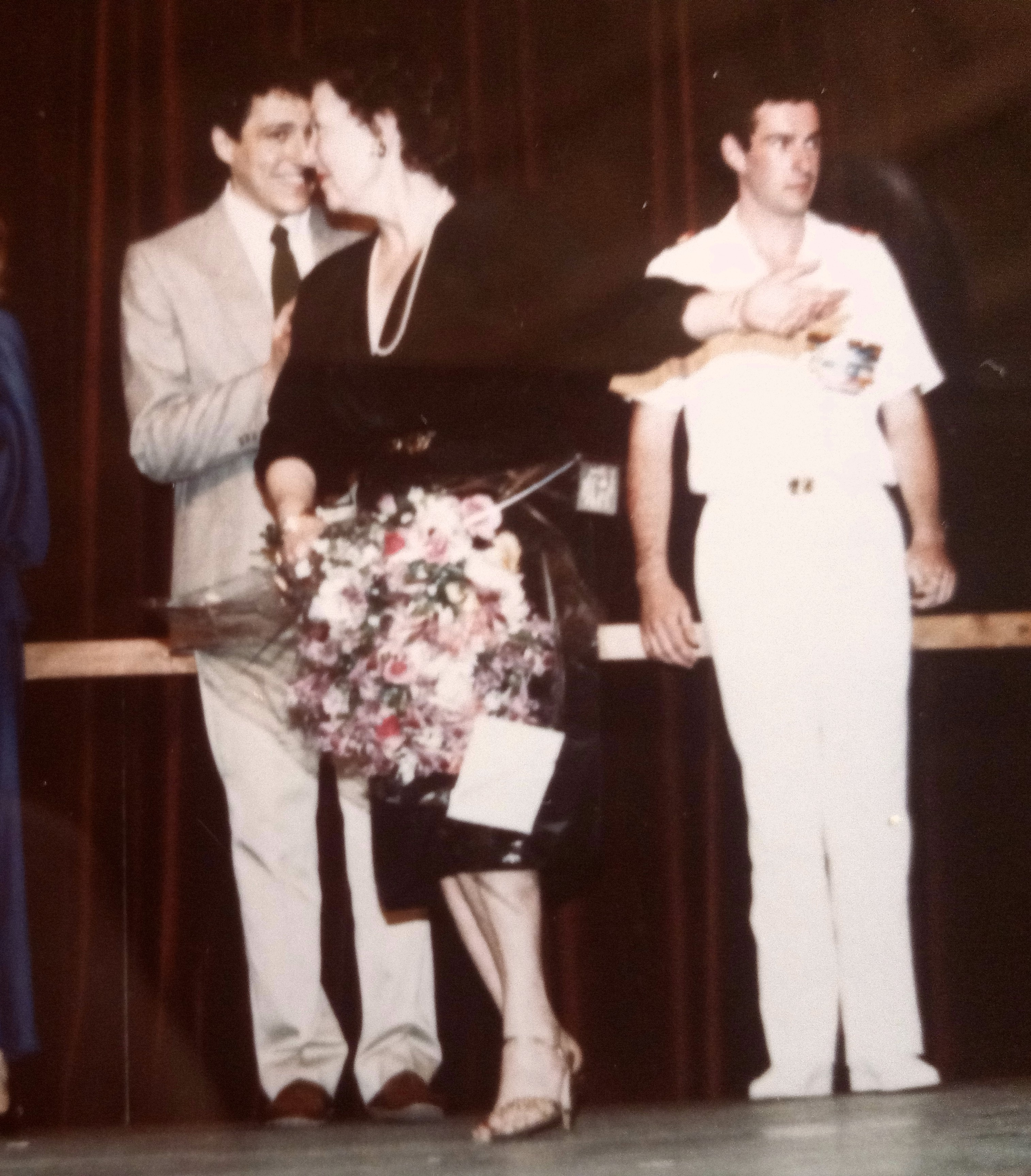 Isabelle Andréani et ses élèves au conservatoire de Toulon. En fond Jean Verne, Paul Médioni 1982. Spectacle de fin d'année. Photo privée Collection Verne